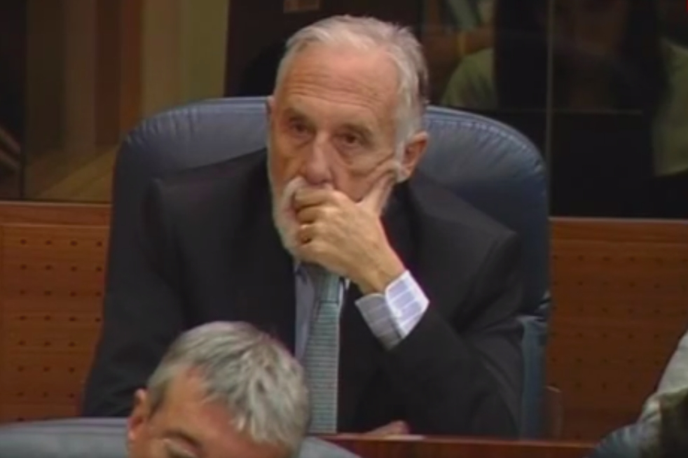 El Presidente de la Comunidad de Madrid, Ignacio González, comparece ante el Pleno de la Asamblea de Madrid, donde pronunciará el discurso inaugural del Debate sobre el Estado de la Región